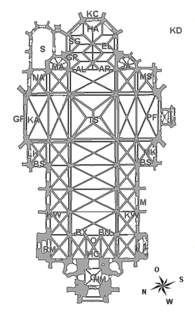 Grundriss der neogotischen St. Mauritius Frankfurt-Schwanheim